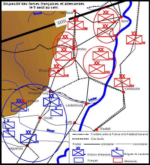 Dispositif des forces françaises et allemandes le 3 août 1870 au soir. Carte personnelle Licence GFDL Carte utilisée pour la fiche bataille de Wissembourg